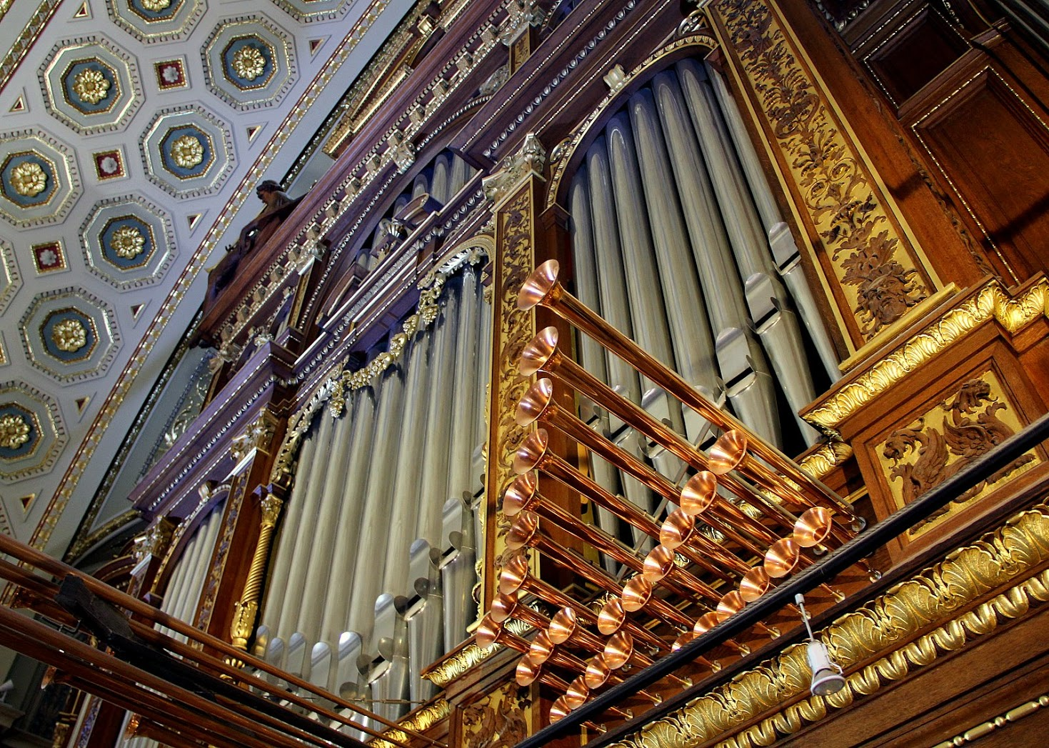 A Szent István-bazilika orgonája - spanyol sípok